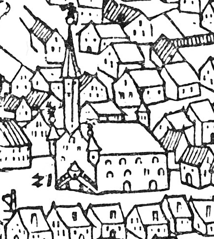 Die Stadt Kempten in einem Holzschnitt von 1569. Der älteste Abdruck den es gibt.